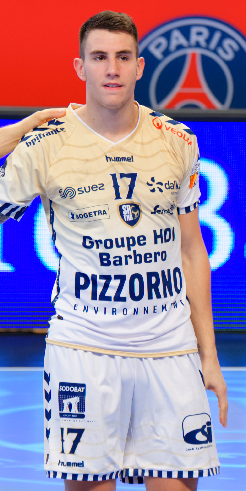 Rencontre de championnat entre le PSG et St Raphaël. A Coubertin, le 5 octobre 2017.